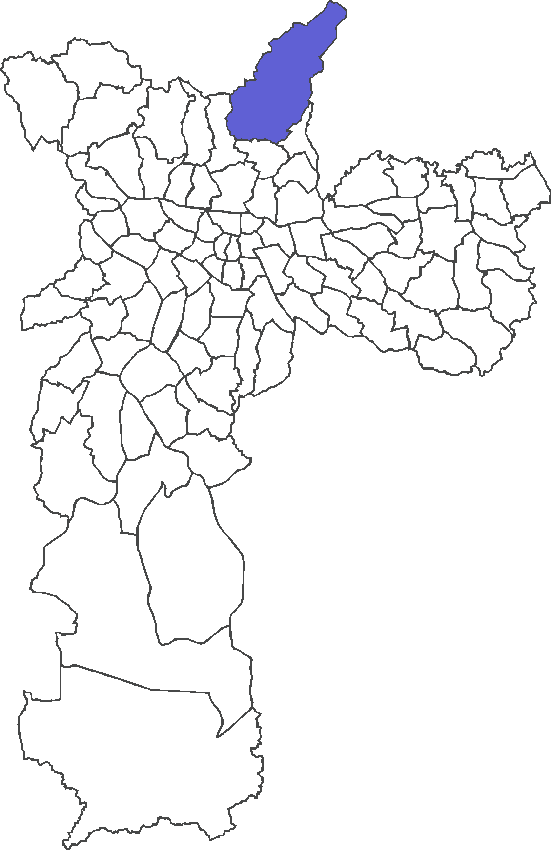 Localização do distrito de Tremembé no município de São Paulo.